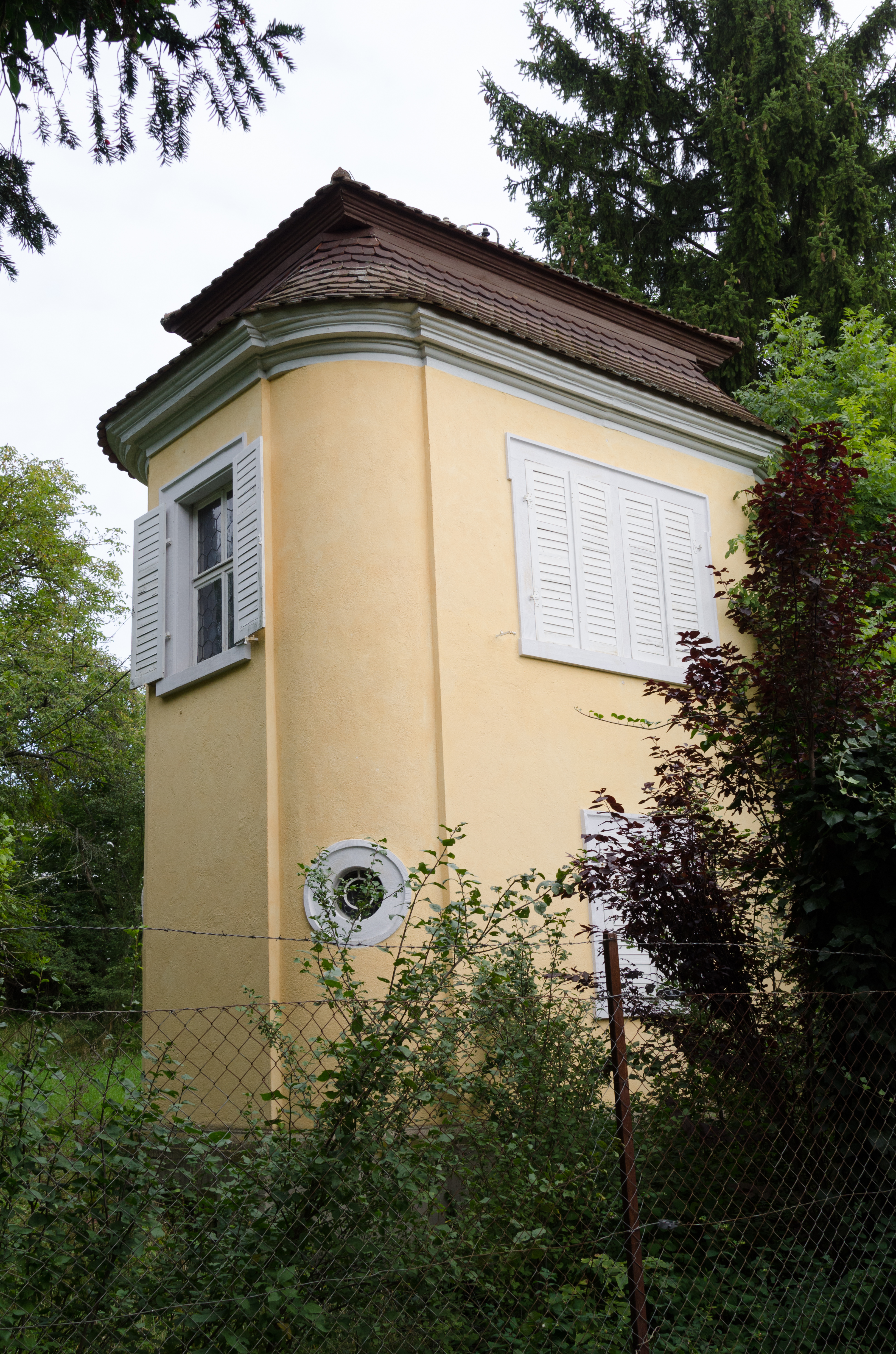 Schweinfurt, Mainberger Straße 32